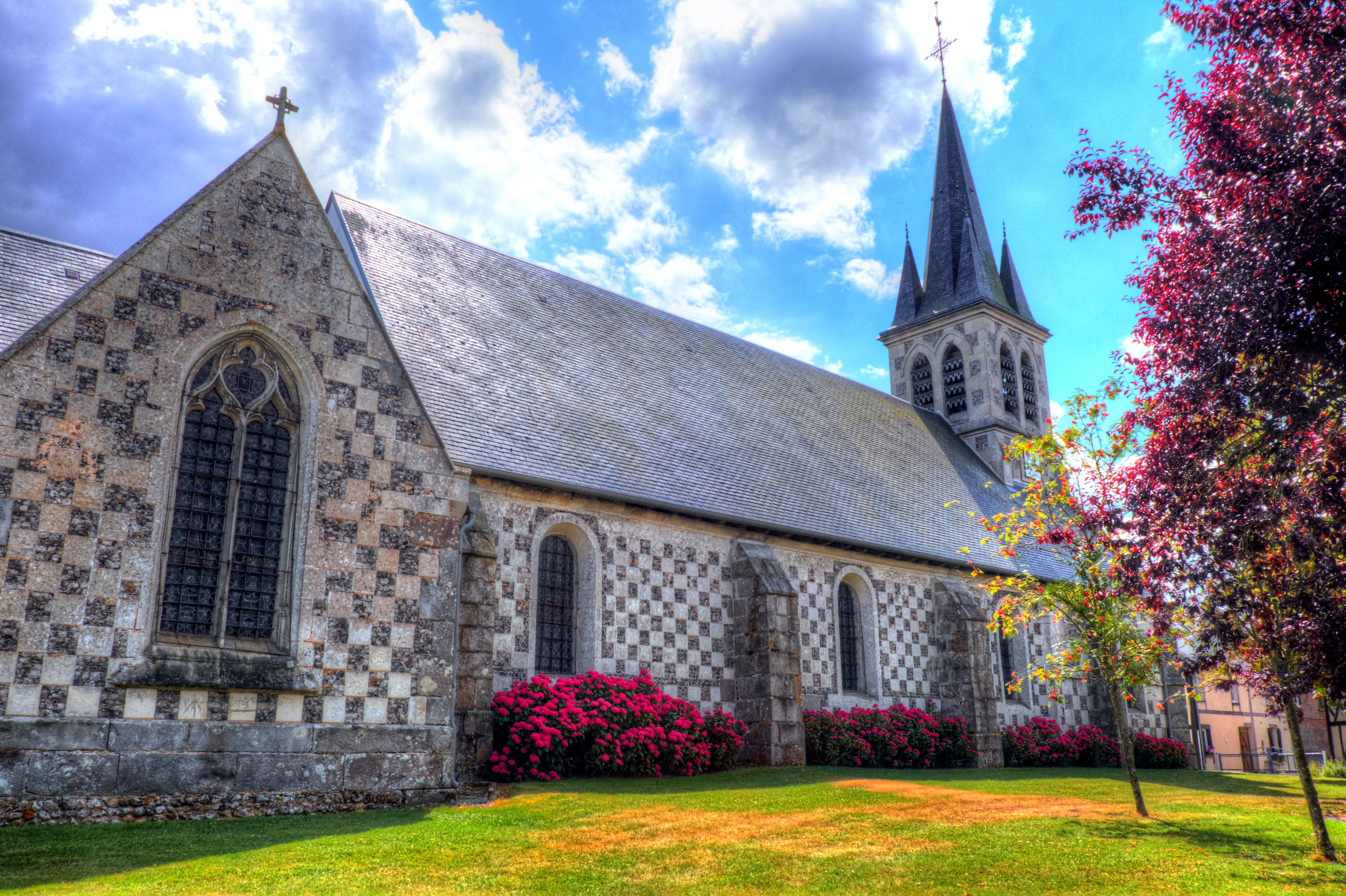 Église Saint-Martin de Thevray (27330), façade nord